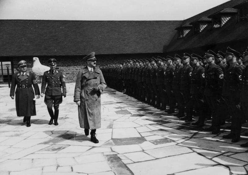 Kreisleitertagung auf der Ordensburg Vogelsang vom 22.-29.04.1937